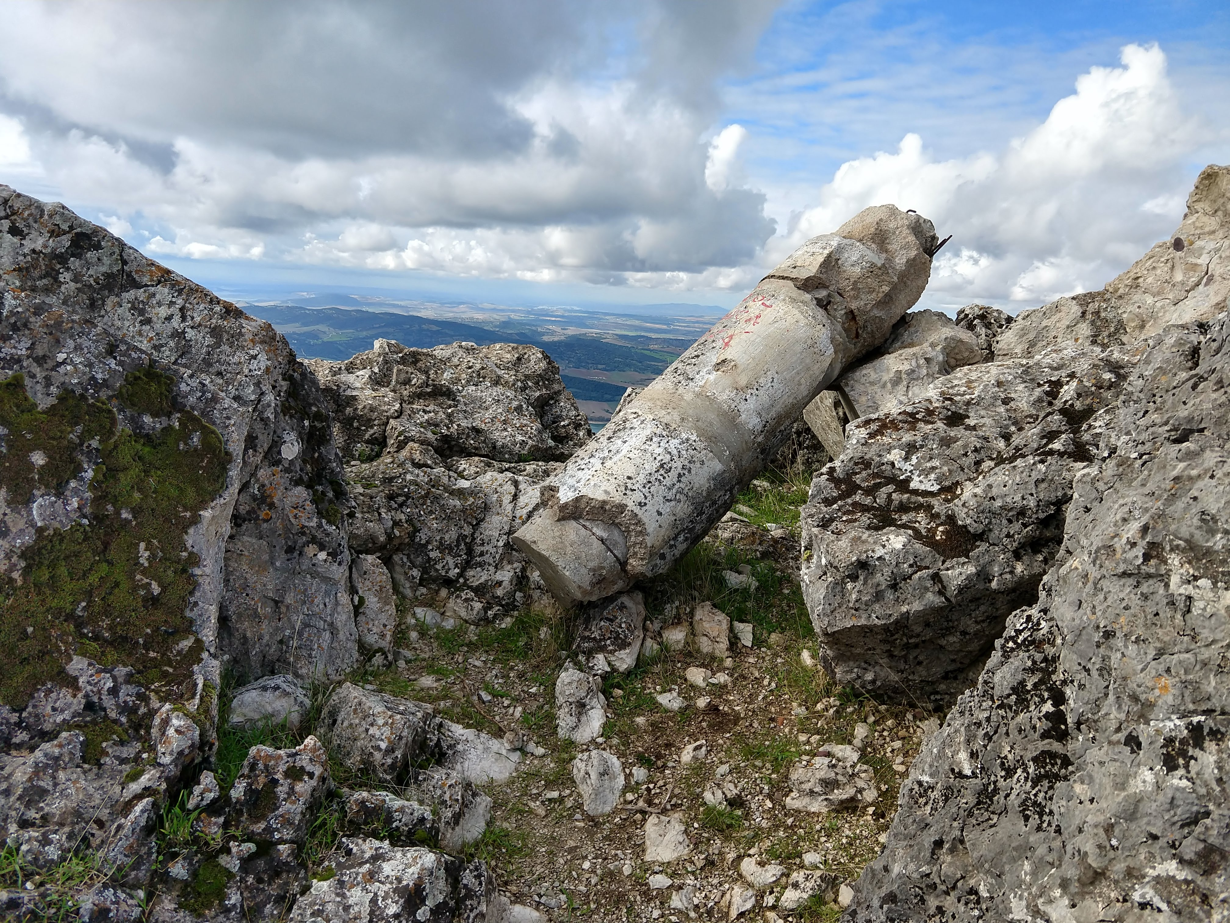 Vértice geodésico del pico Silla en Noviembre de 2018.